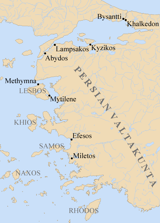 Joonia Peloponnesolaissodan aikana.